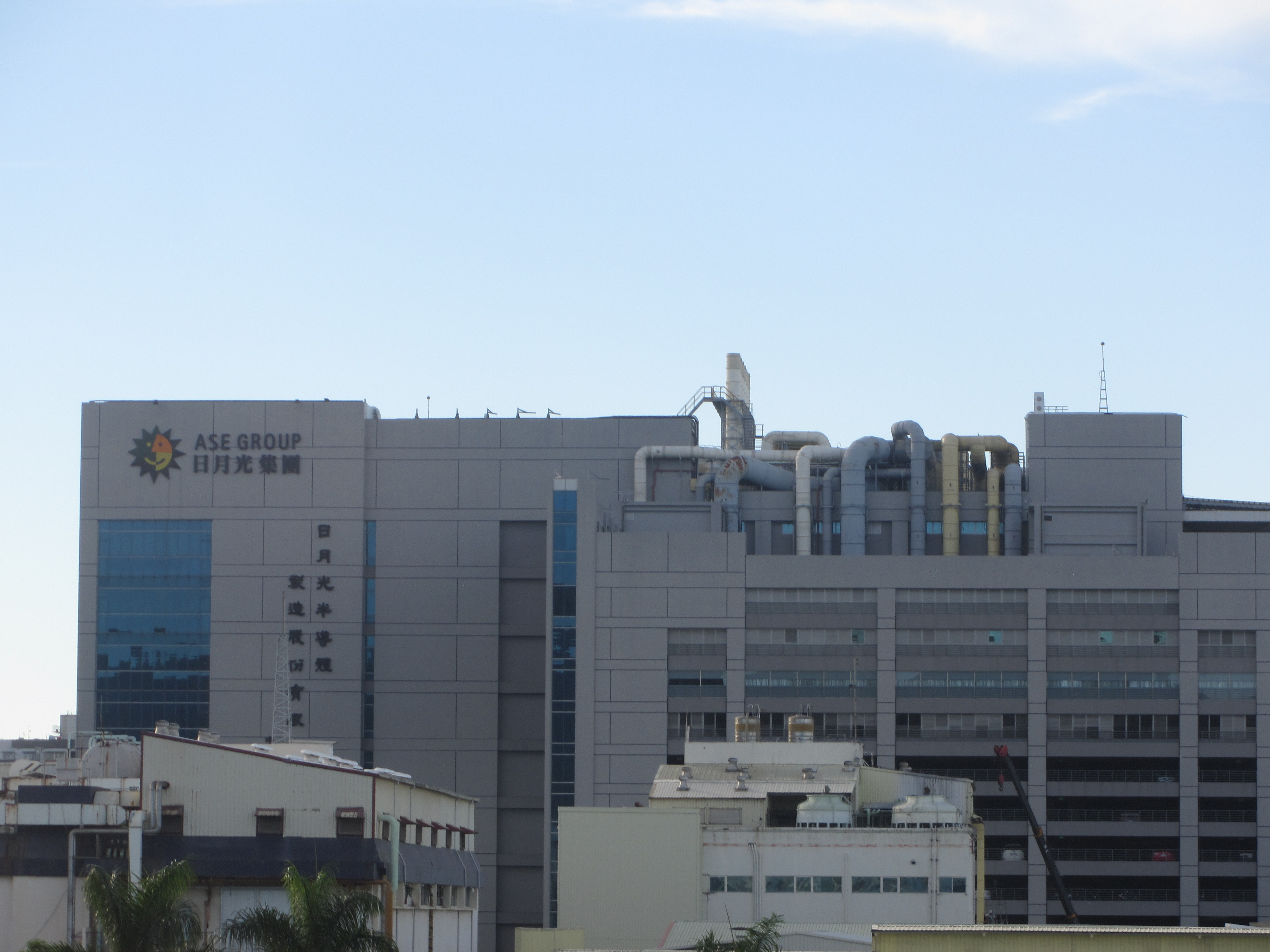 日月光半導體在高雄市楠梓區的廠房。